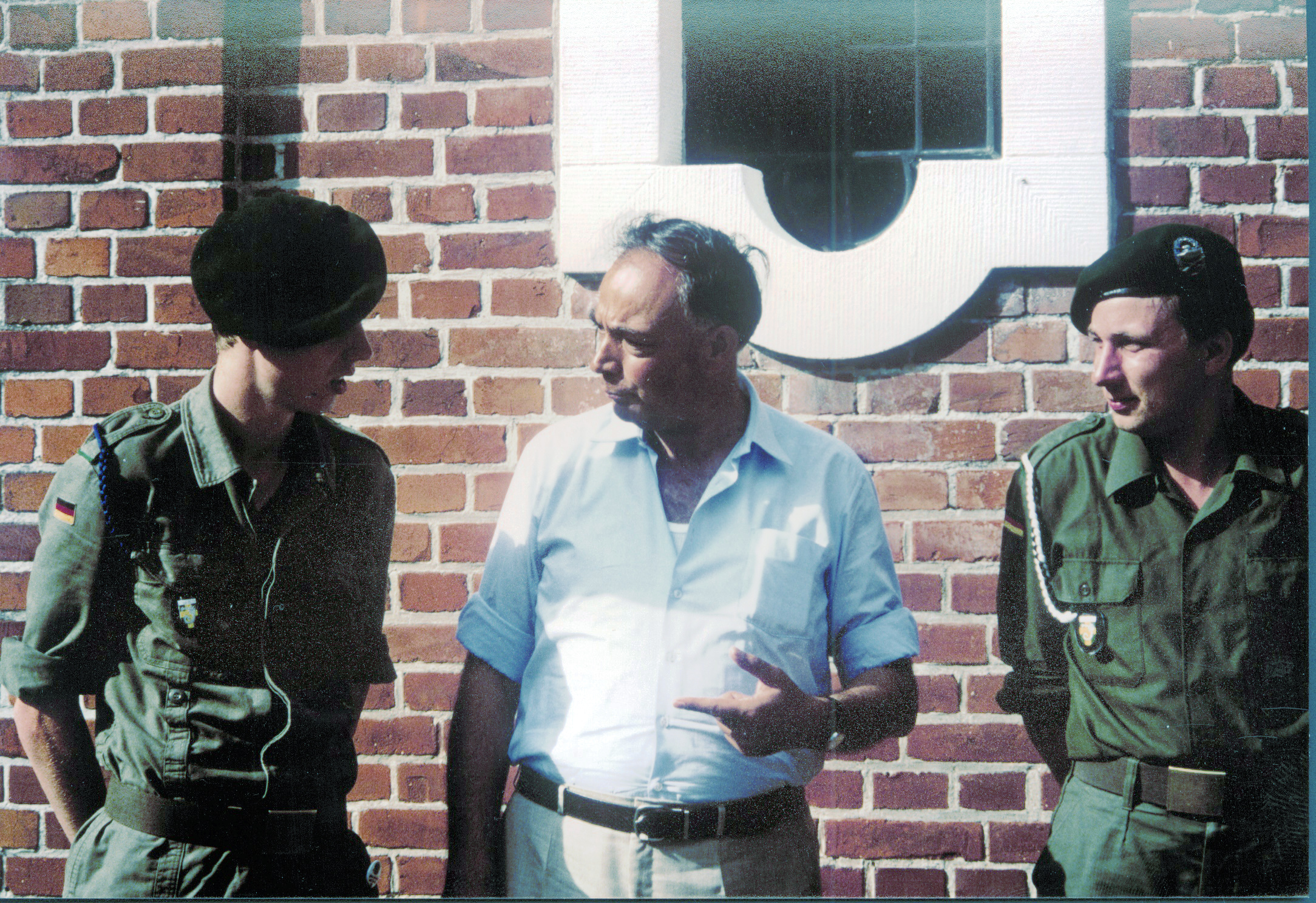 Bischof Reinhard Lettmann wollte, wie Karl Carstens mit Deutschland, sein Bistum durchwandern - und zwar auf Wallfahrten. Dazu lud er Menschen ein, mit denen er beten und sprechen wollte. Bei dieser Wallfahrt bildeten die Theologiestudenten aus dem Collegium Borromaeum Münster und Soldaten der Bundeswehr die beiden großen Gruppen. Manche Privatpersonen schlossen sich dem Zug an oder liefen ein Stück der Strecke mit. Die Route ging durch den nördlichen Teil des Offizialatsbezirks Oldenburg, entlang der Weser durch die Wesermarsch vom 28.08.1989 – 01.09.1989. Untergebracht wurden die Wallfahrer in Pfarrzentren, Turnhallen, Kasernen der Bundeswehr (Marine) und bei privaten Mitgliedern der jeweiligen Pfarrgemeinde vor Ort. An jeder Station wurde eine feierliche Messe in der Pfarrkirche gehalten. Hier der Bischof mit zwei Soldaten (Dienstgrad Panzergrenadier) des Panzergrenadierbataillons 192, links 4./194 und rechts 1./192 Ablauf der Wallfahrt 27.08.89 Anfahrt aus Ahlen und Handorf 28.08.89 Burhave nach Nordenham 29.08.89 Nordenham nach Brake 30.08.89 Brake nach Delmenhorst 31.08.90 Delmenhorst nach Wildeshausen 01.09.91 Wildeshausen nach Bethen 02.09.91 Rückfahrt nach Ahlen und Handorf